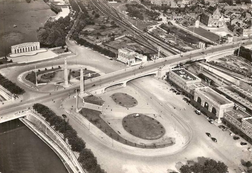 Le parvis de la gare vers 1950.